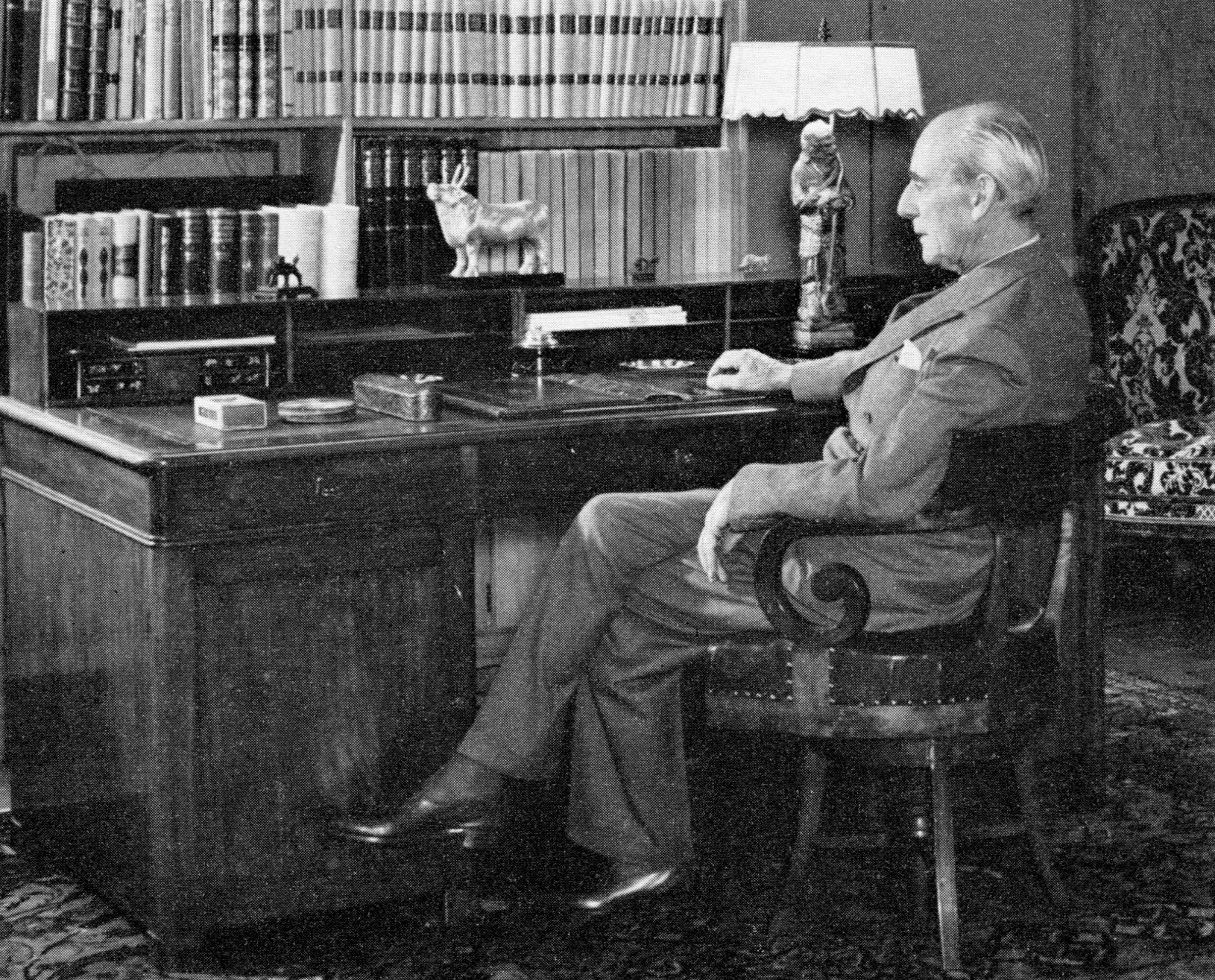 Carl Kempe på Ekolsunds slott